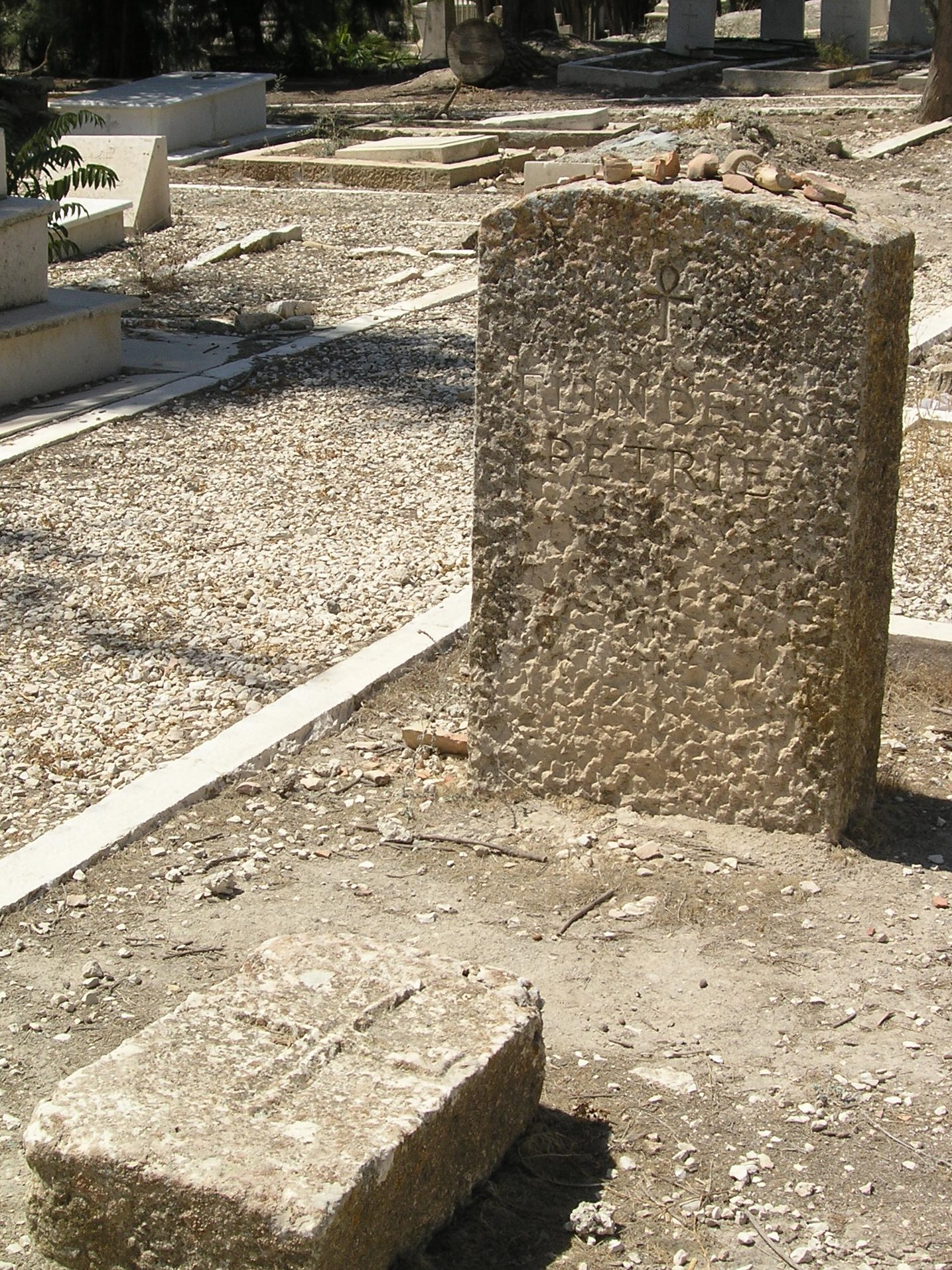 Grab von Sir William Matthew Flinders Petrie auf dem Protestantischen Friedhof am Zionsberg in Jerusalem. Archäologen von benachbarten Grabungen zollen ihm Respekt und legen gelegentlich eine Scherbe auf den Grabstein.